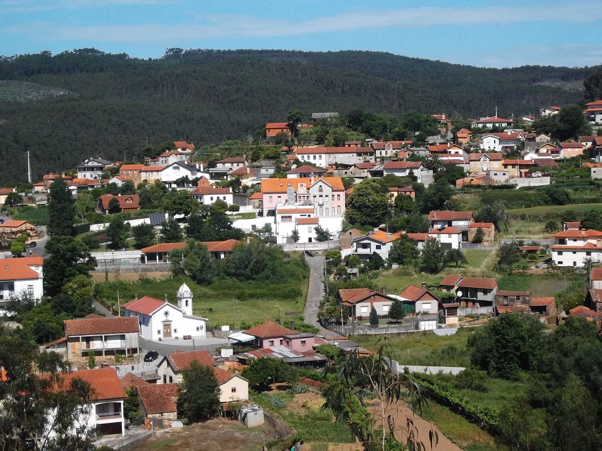 Vista parcial de Telhadela